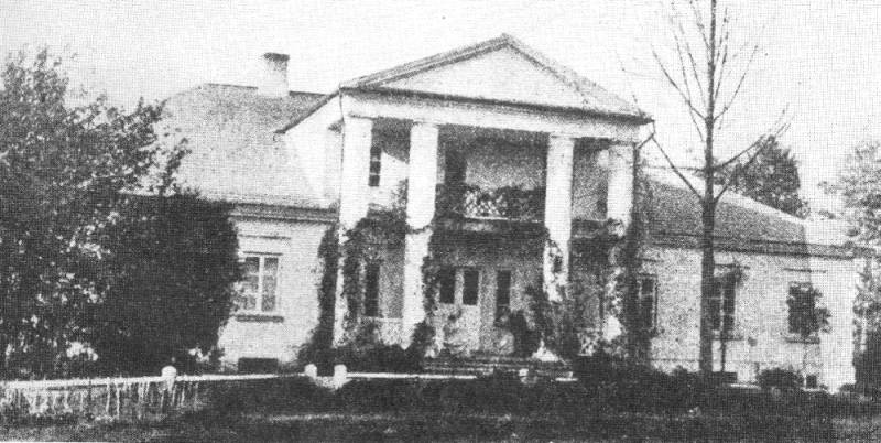 Skaraitiškės dvaro sodyba